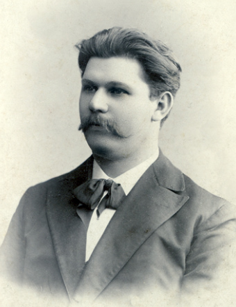 Іван Стешенко, м. Київ